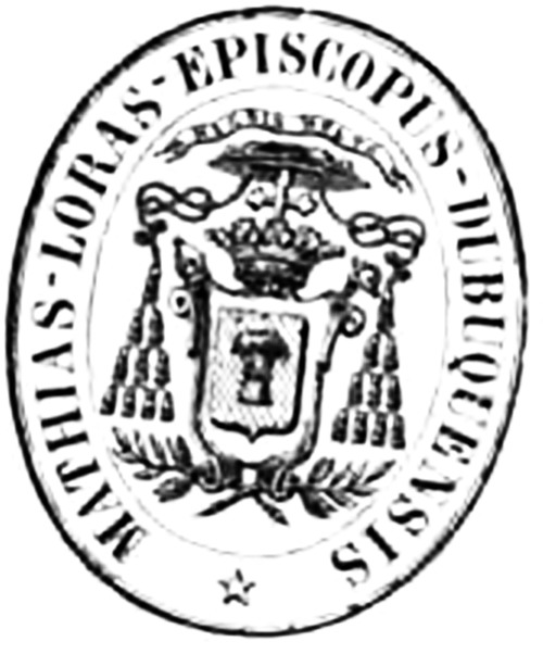 Siegel des Bischofs Mathias Loras mit Bischofswappen